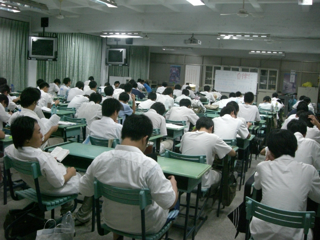 高雄中學軍訊大樓二樓